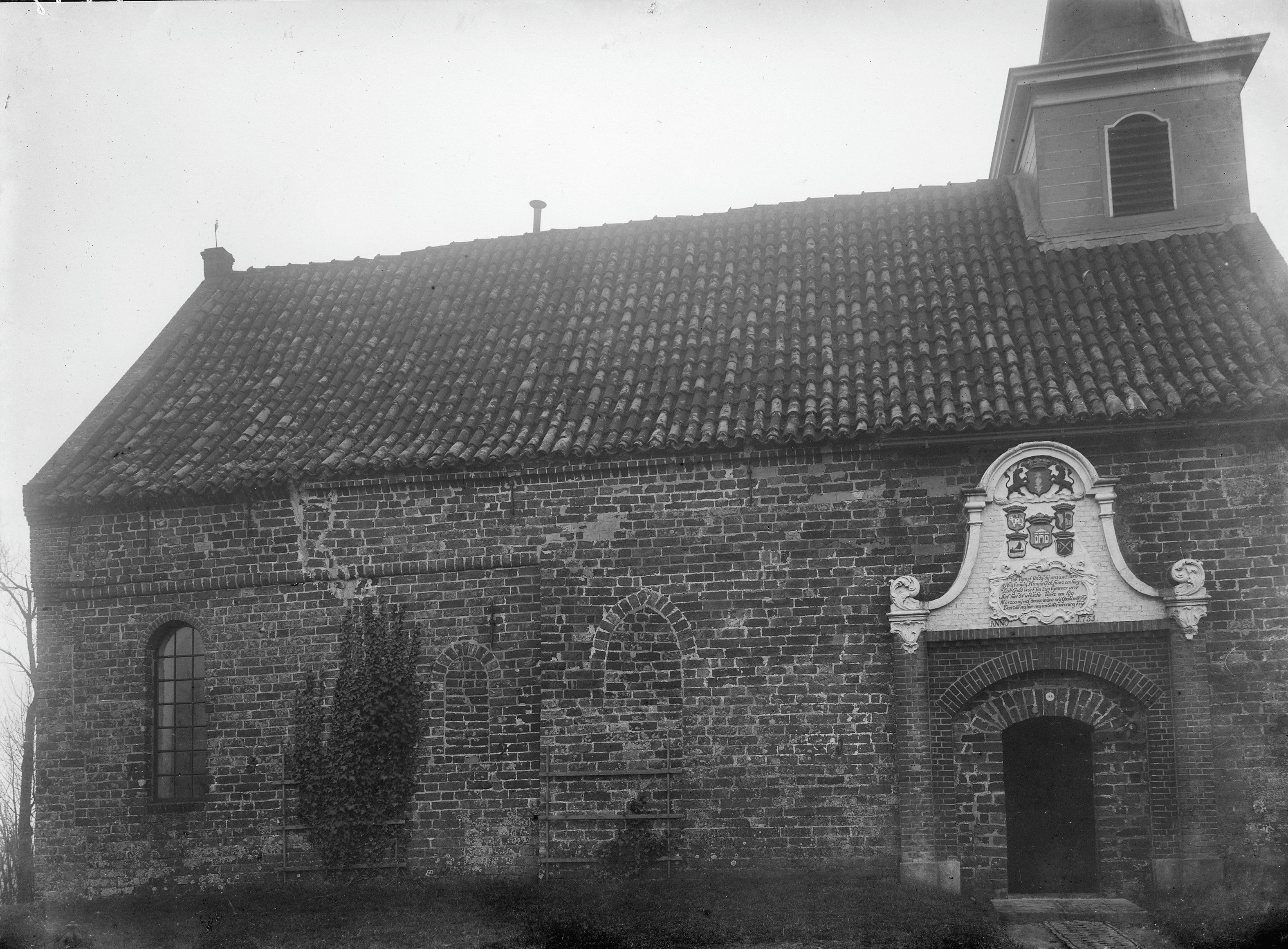 N.H.Kerk: noord-gevel